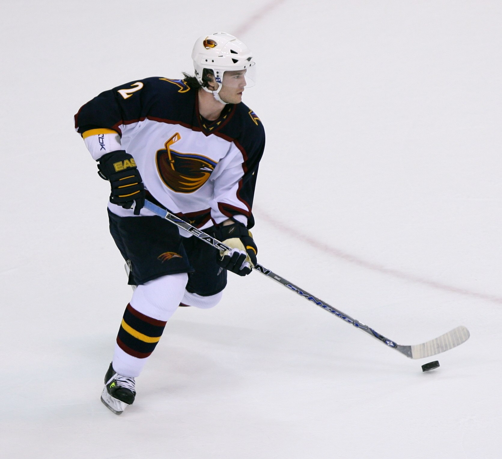 RO9A1312